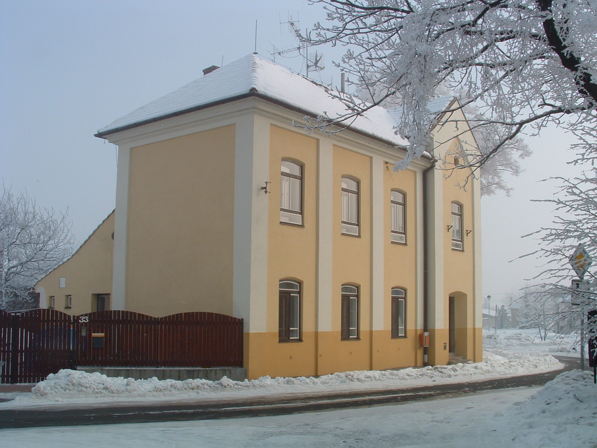 Budova školy byla vystavěna v roce 1860 arcibiskupským stavitelem Králíčkem nákladem obce Bílany. Dnes se zde nachází knihovna.